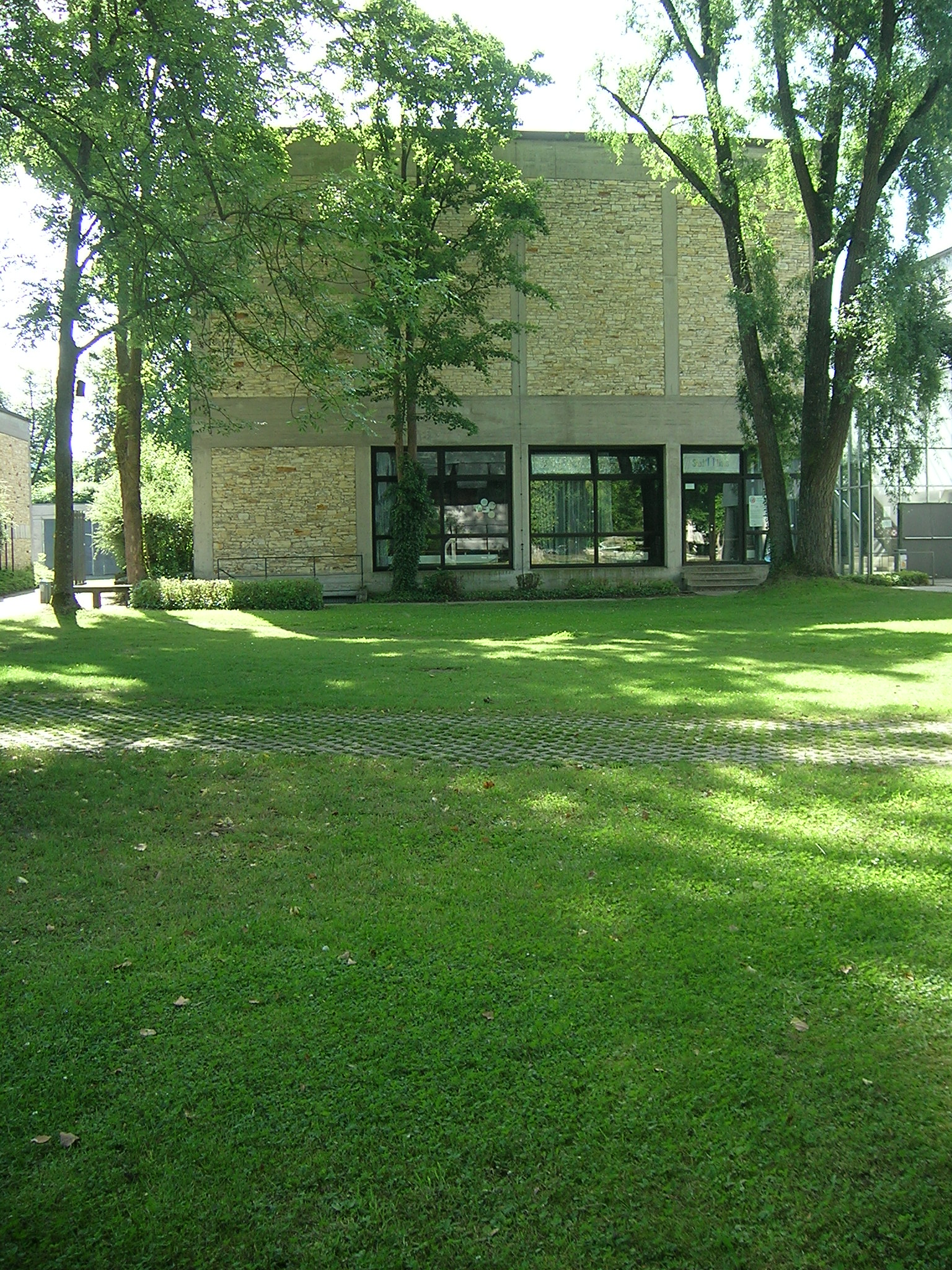 Ostenstraße 28 Eichstätt: Kollegiengebäude der Katholischen Universität Eichstätt-Ingolstadt.